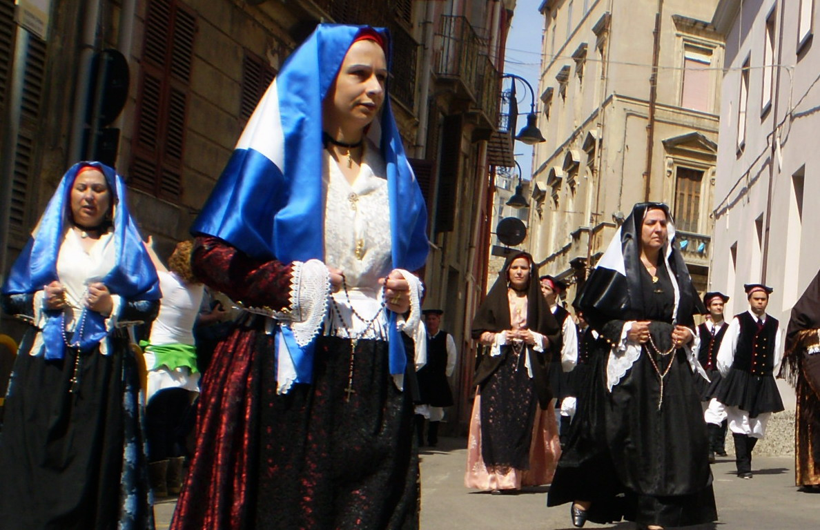 Costumi tradizionali di Villamassargia (CI)